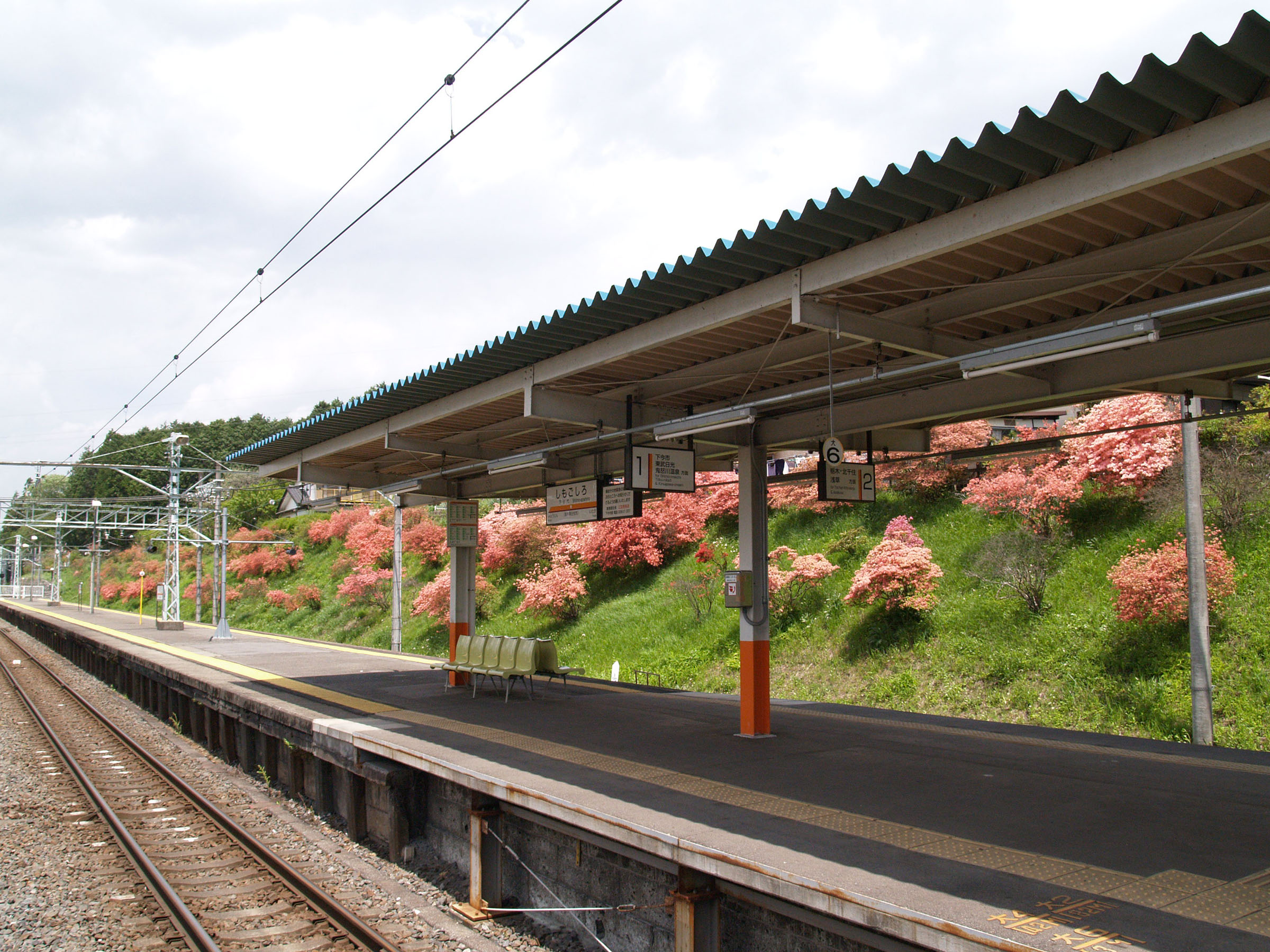 下小代駅ホーム